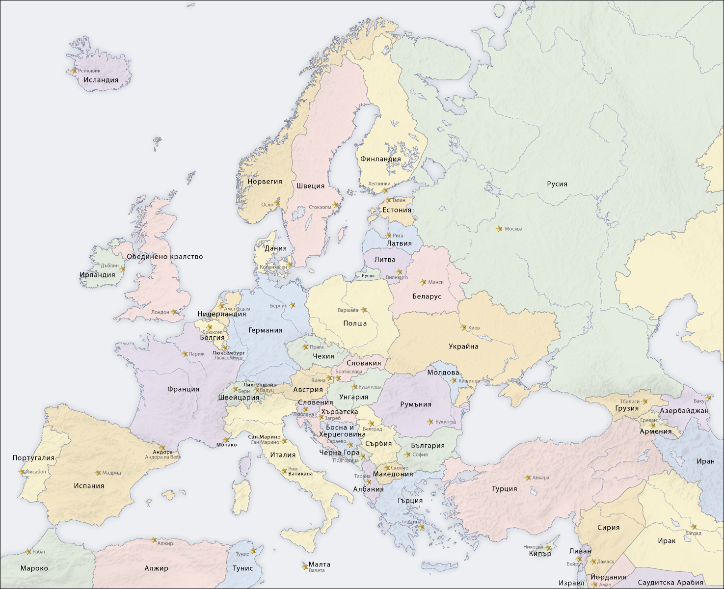 Страните в Европа, карта с наименования на страните и столици на български език.